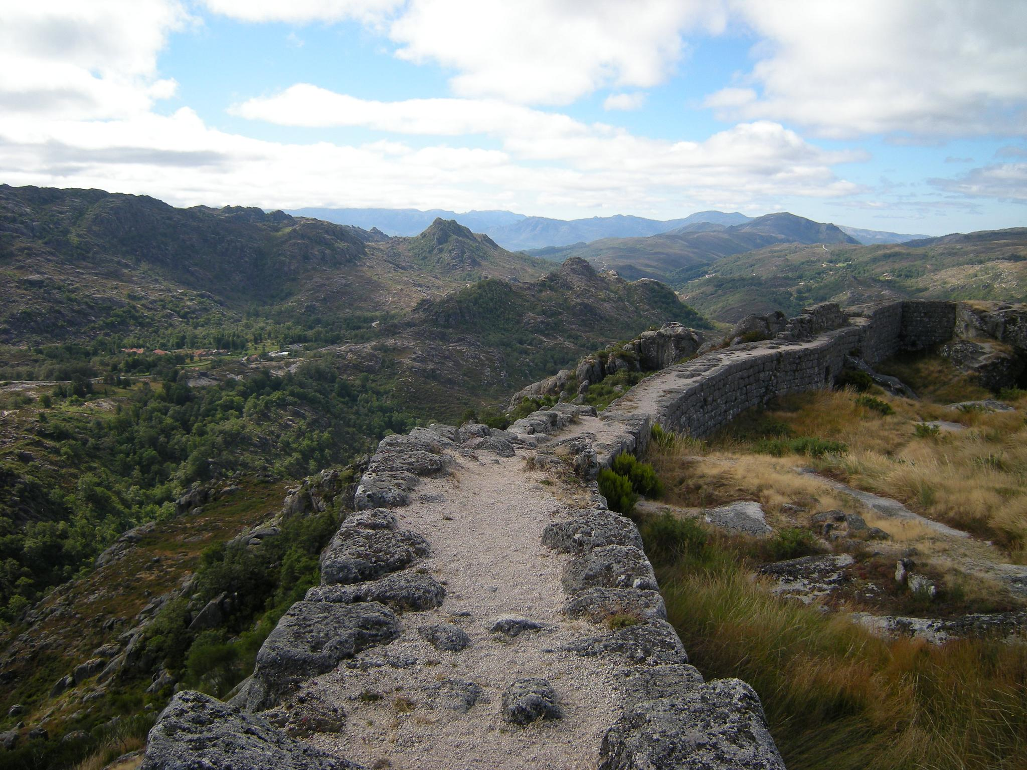 Castelo de Castro Laboreiro, Melgaço